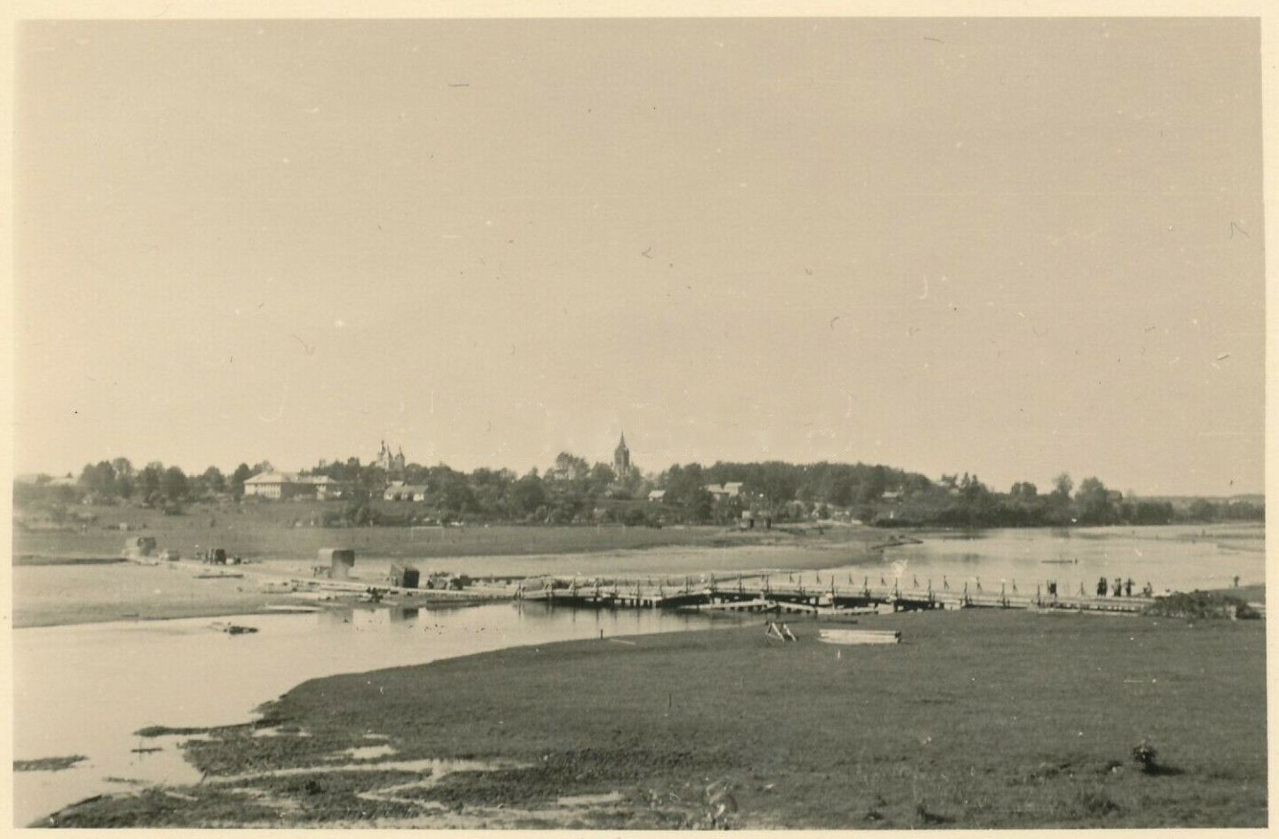 Беларуская (тарашкевіца): Вялейка (Vialejka), рака Вяльля (Vialla)